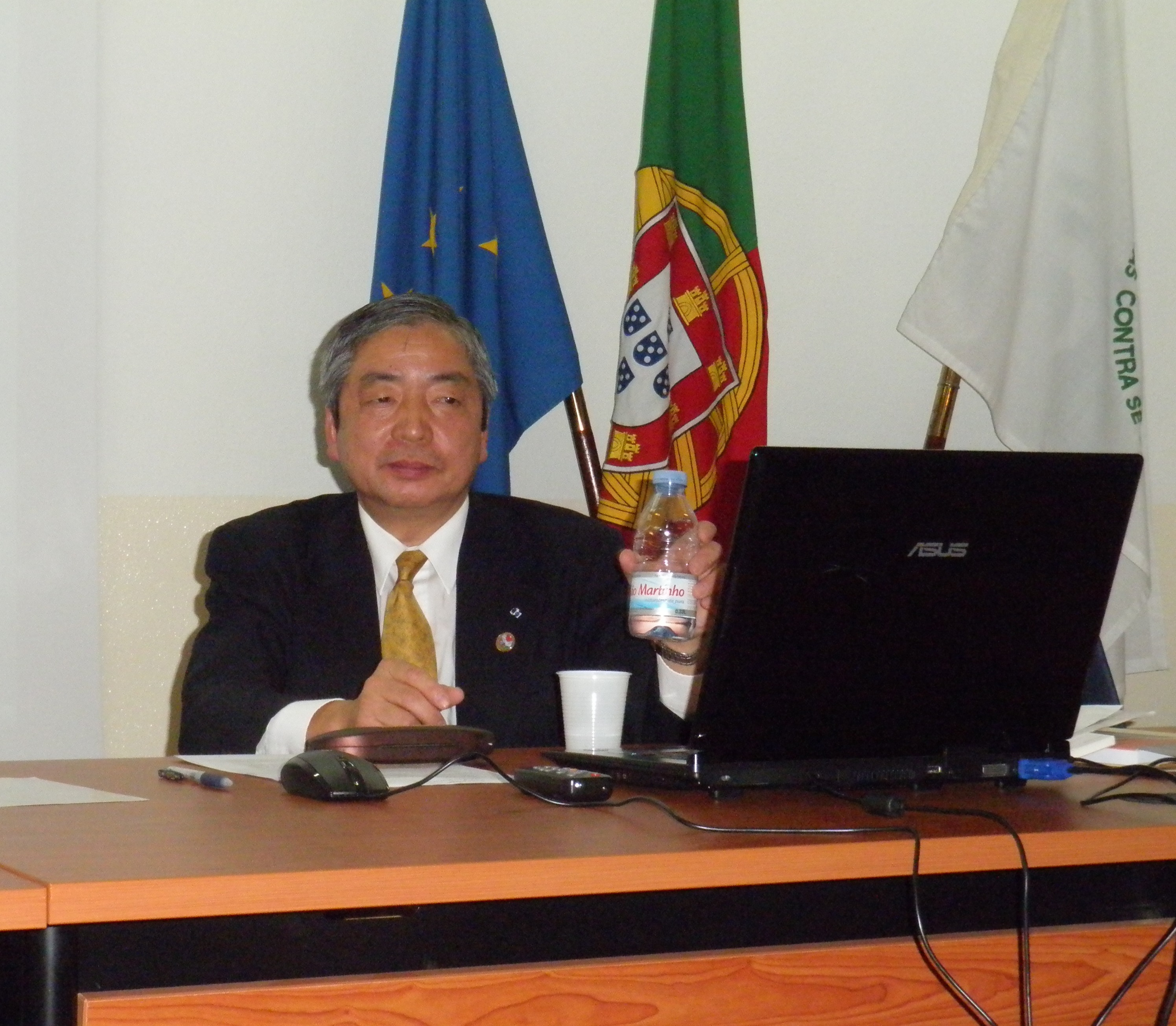 リスボン新大学国際会議